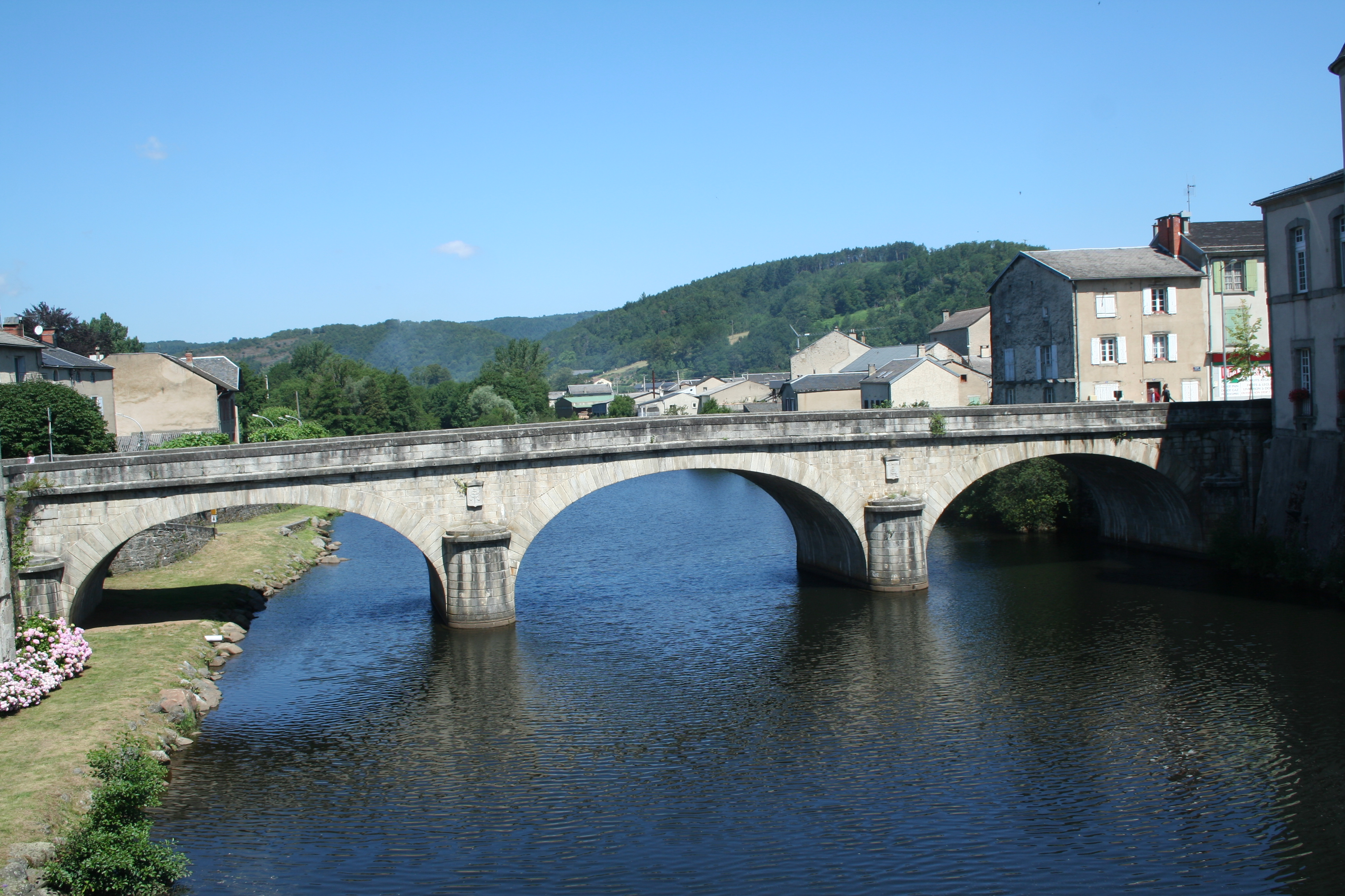 Brassac (Tarn) - pont.